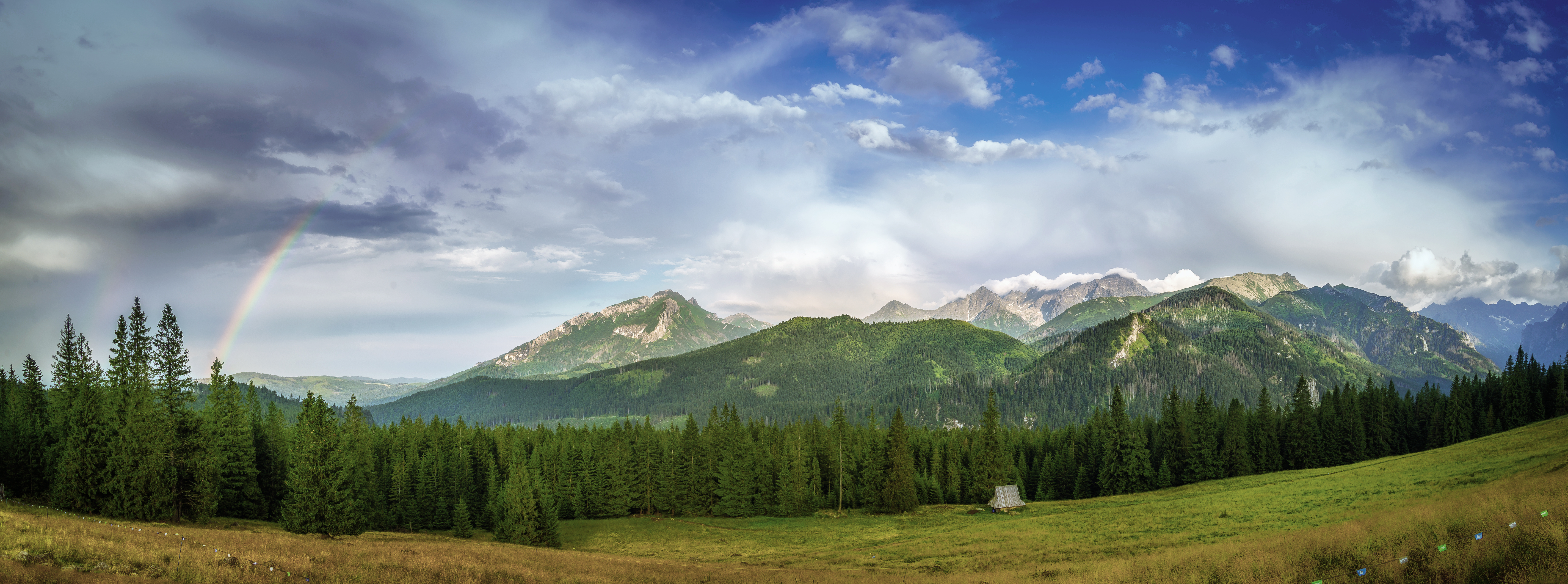 Obszar specjalnej ochrony ptaków Tatry. This is a photography of Natura 2000 protected area with ID PLC120001